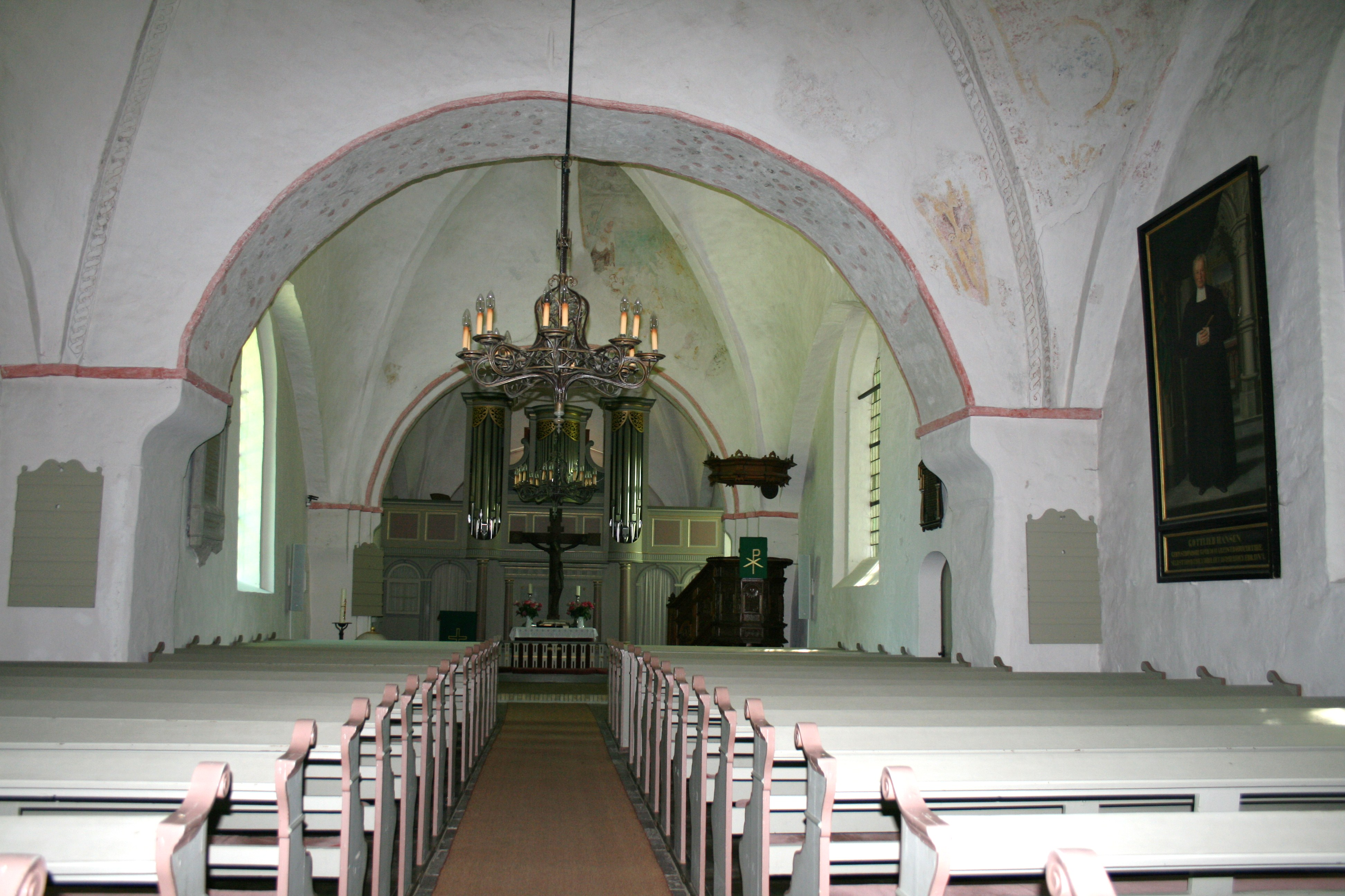 Innenraum der Kirche Sieseby